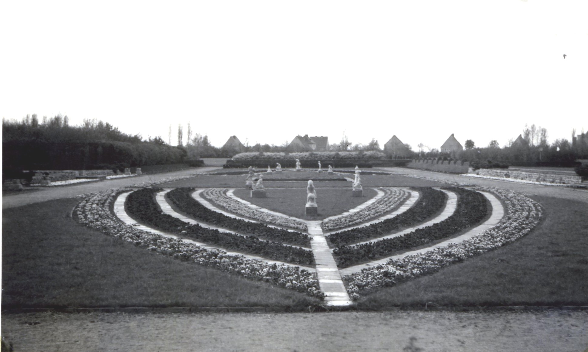 Vogelgesangpark in Magdeburg im Jahr 1937